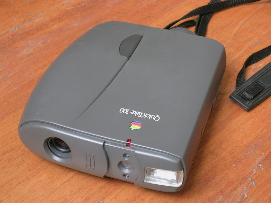 appareil numérique Apple Quicktake 100